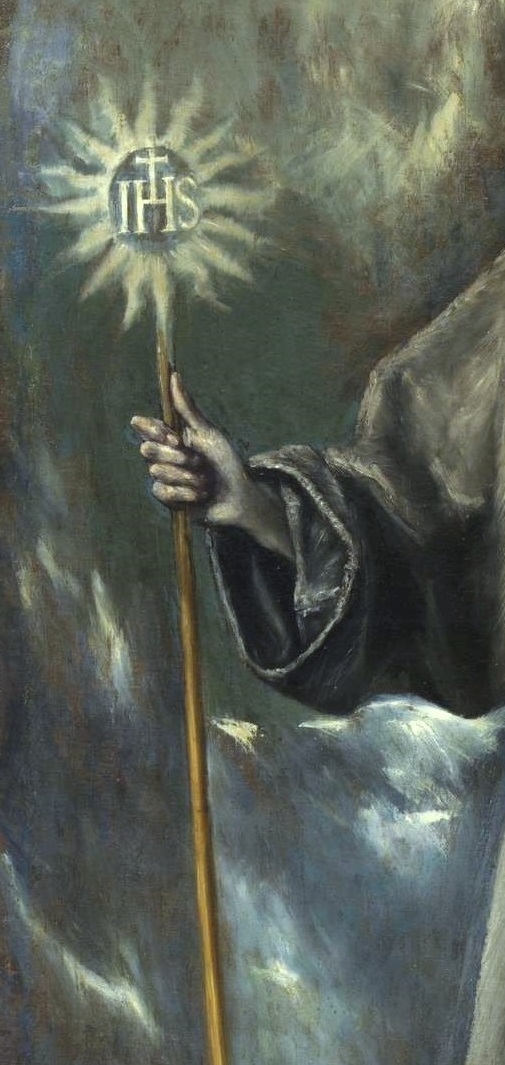 La obra representa a San Bernardino de Siena (1380-1444), fraile franciscano y también misionero.